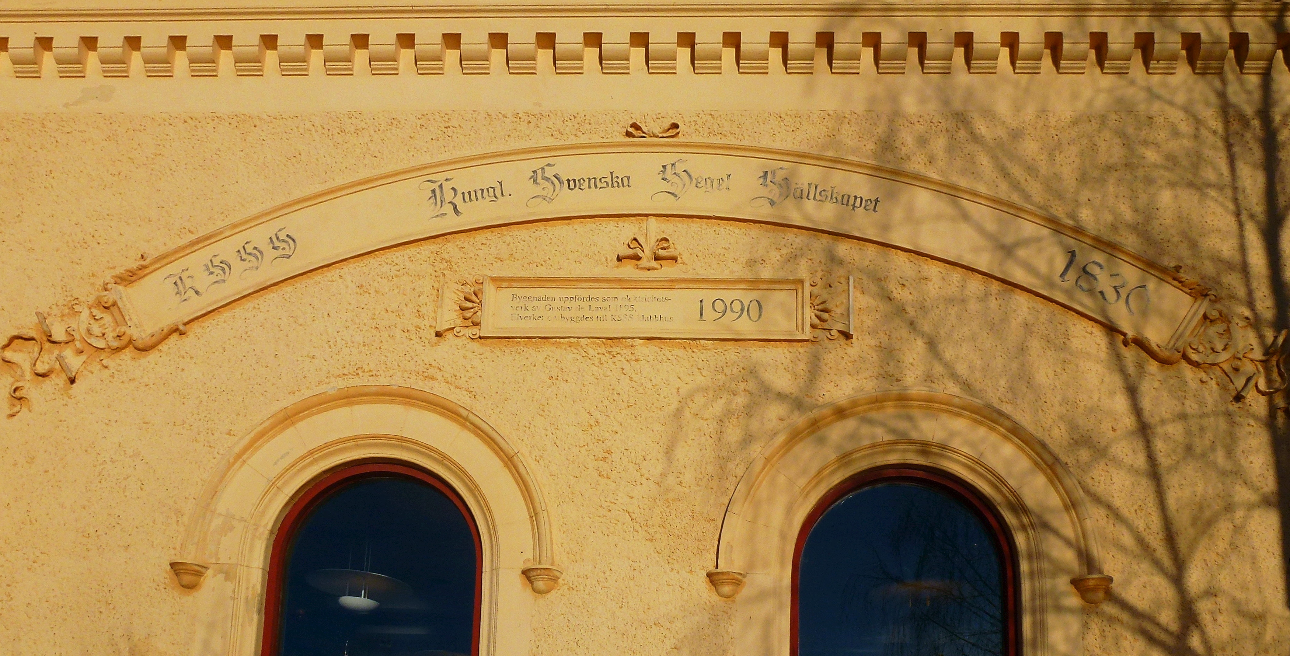 Saltsjöbadens elverk fasad